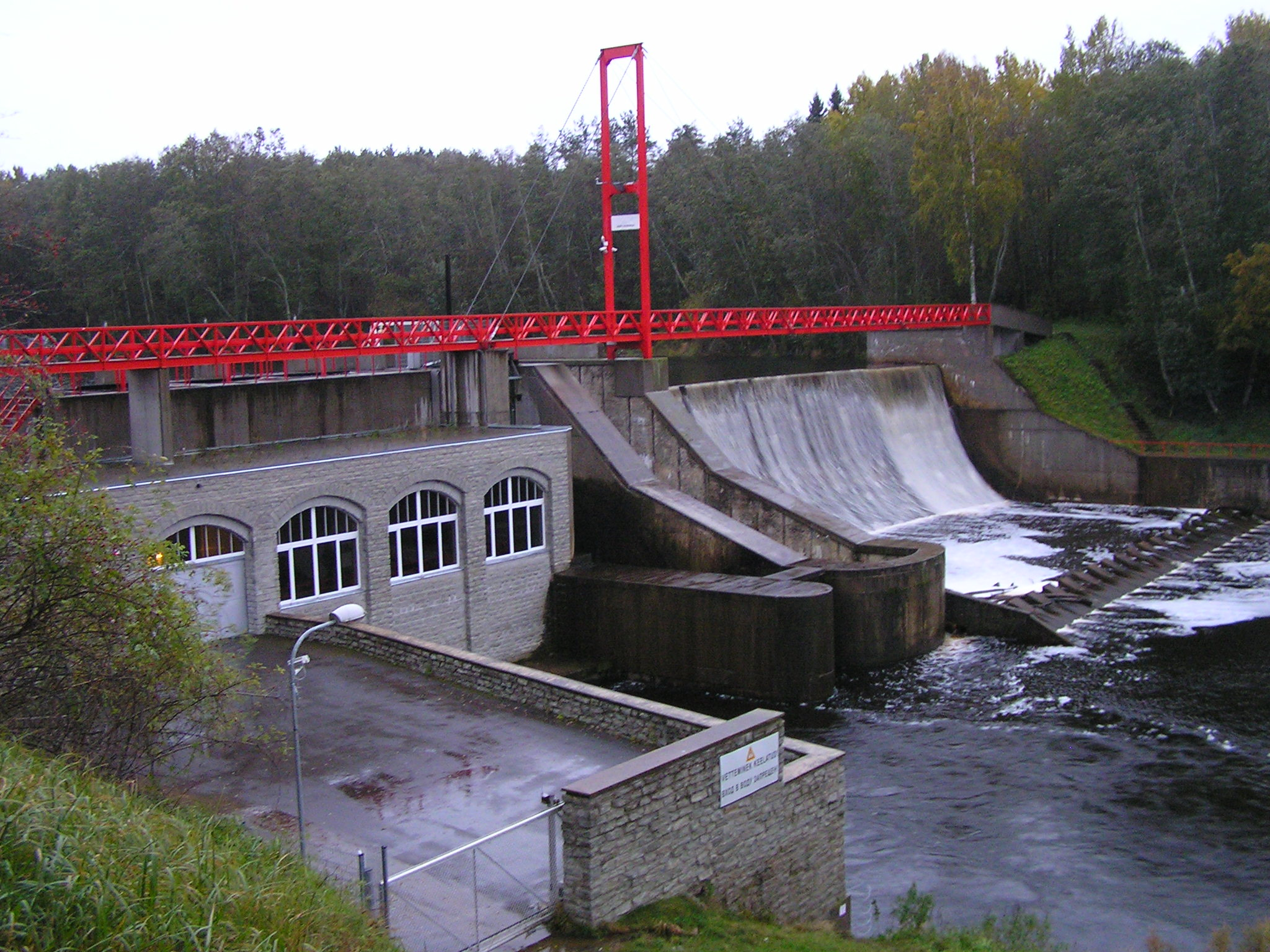 Linnamäe hüdroelektrijaam töötava ülevooluga.